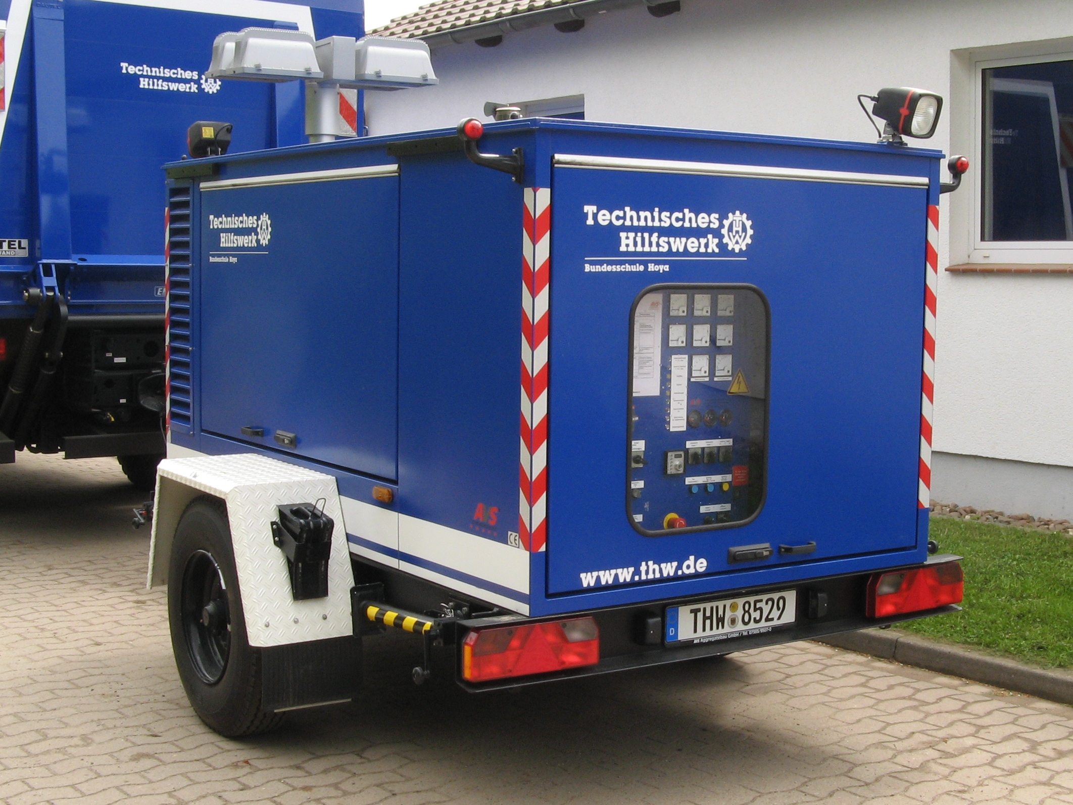 Technisches Hilfswerk THW Anhänger Anh Netzersatzanlage NEA 50 kVA der Bundesschule BUS in Hoya